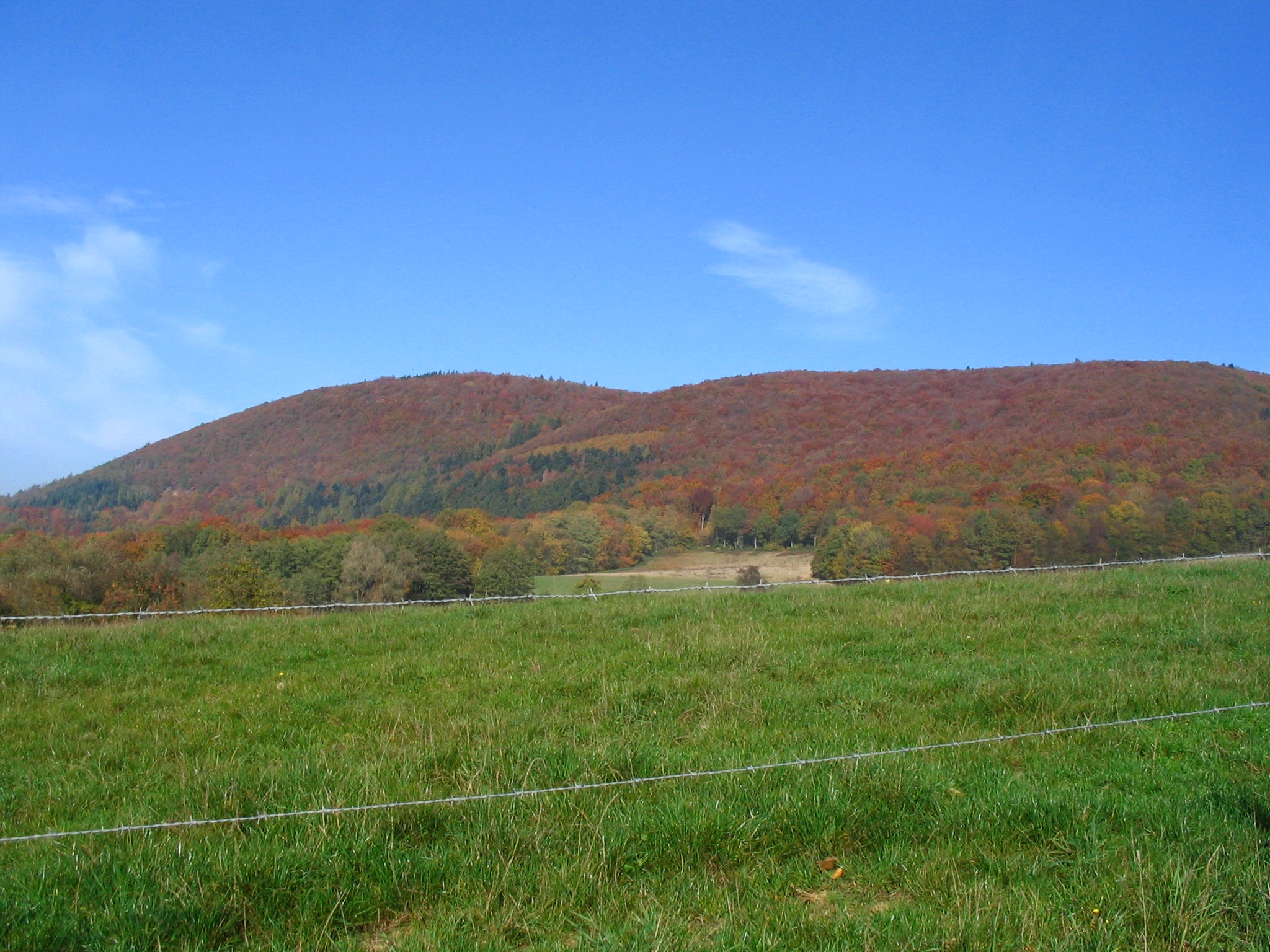 Der Königsberg im Herbst